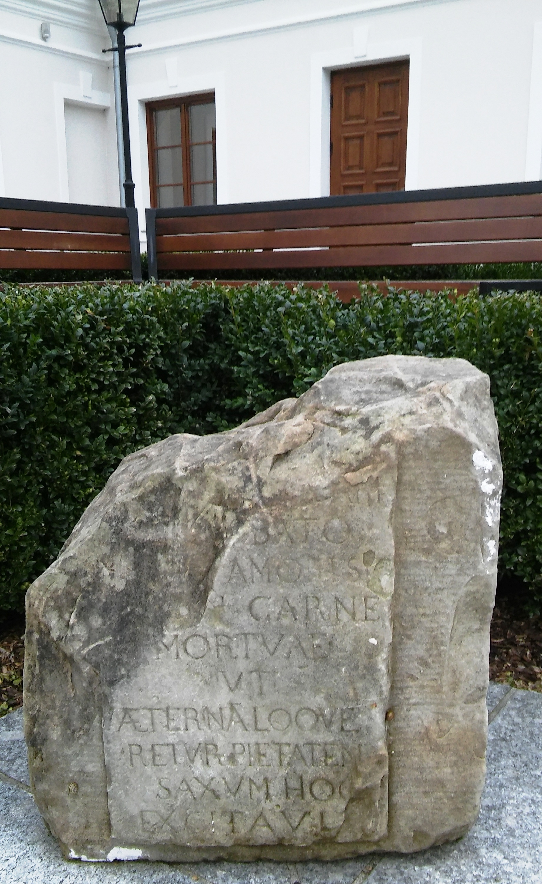 Johann Oestreich(1750-1833), Unternehmer, Stein in Brniewo (Braunsberg)